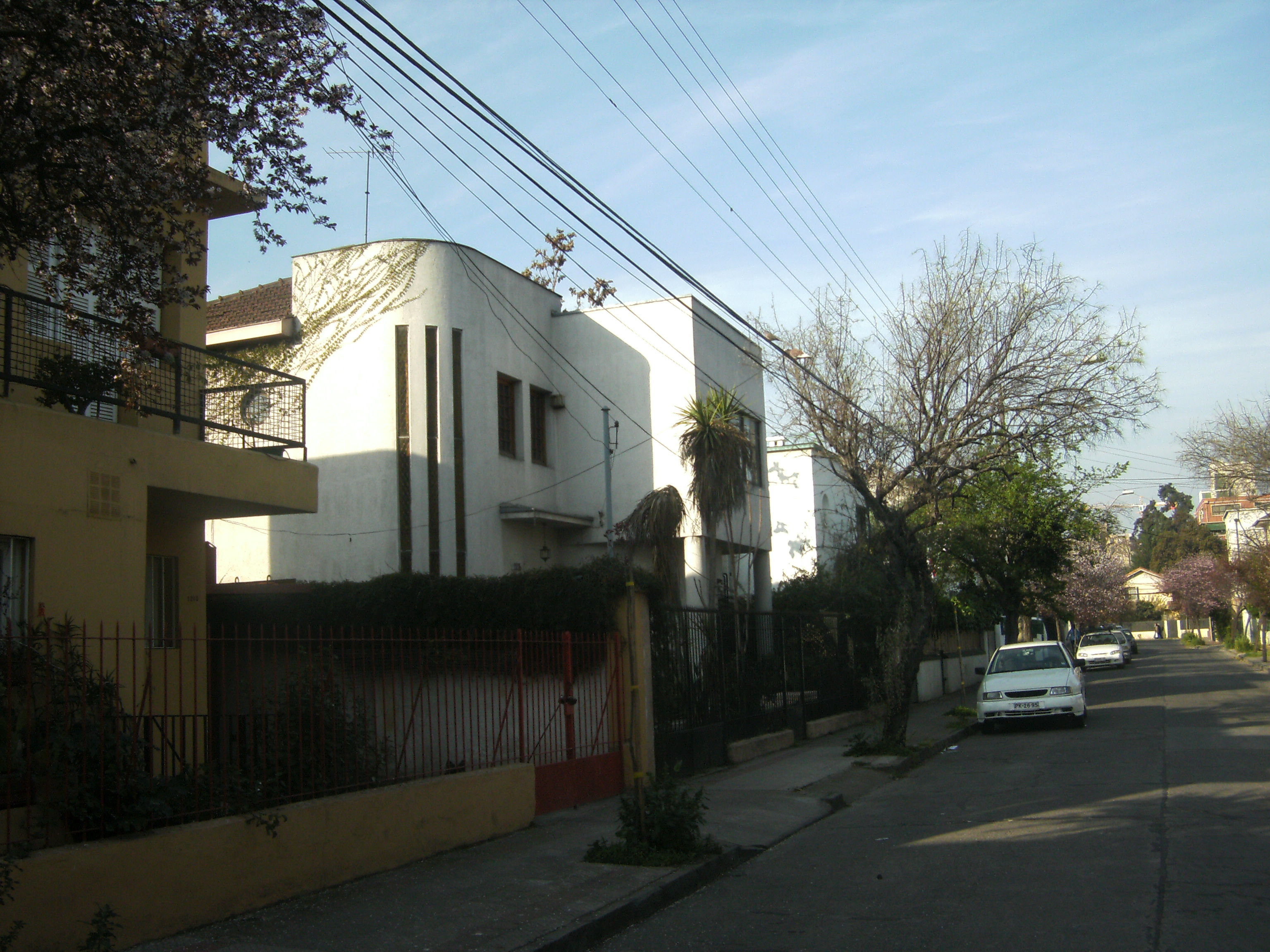 Calle Keller, barrio ubicado en calle Manuel Montt ubicada en la comuna de Providencia en Santiago de Chile This is a photo of a national monument in Chile: 245